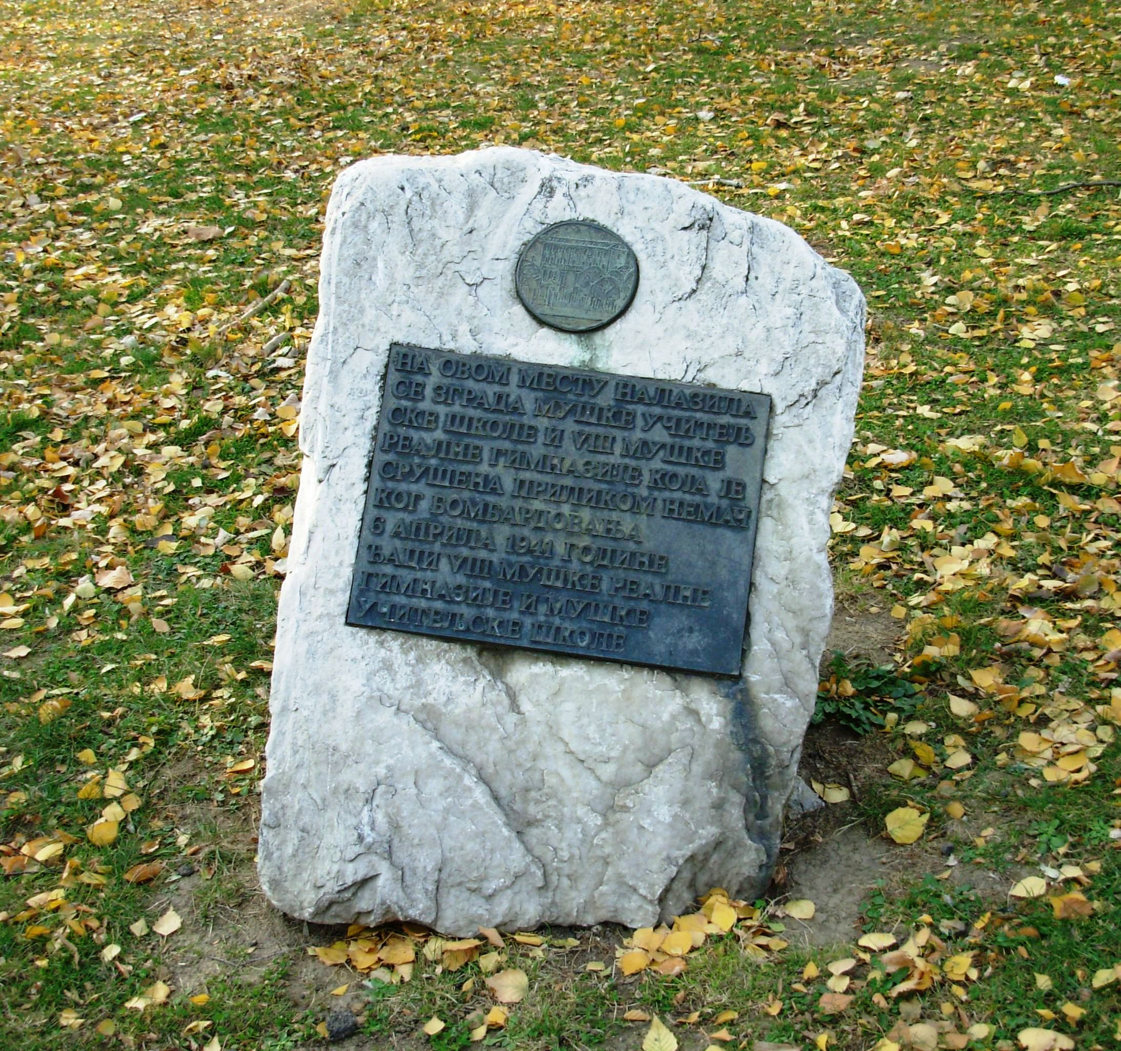 Споменик осмој београдској гимназији у Карађорђевом парку, Београд. Сликао Голдфингер